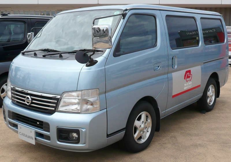 Nissan Caravan Silkroad.